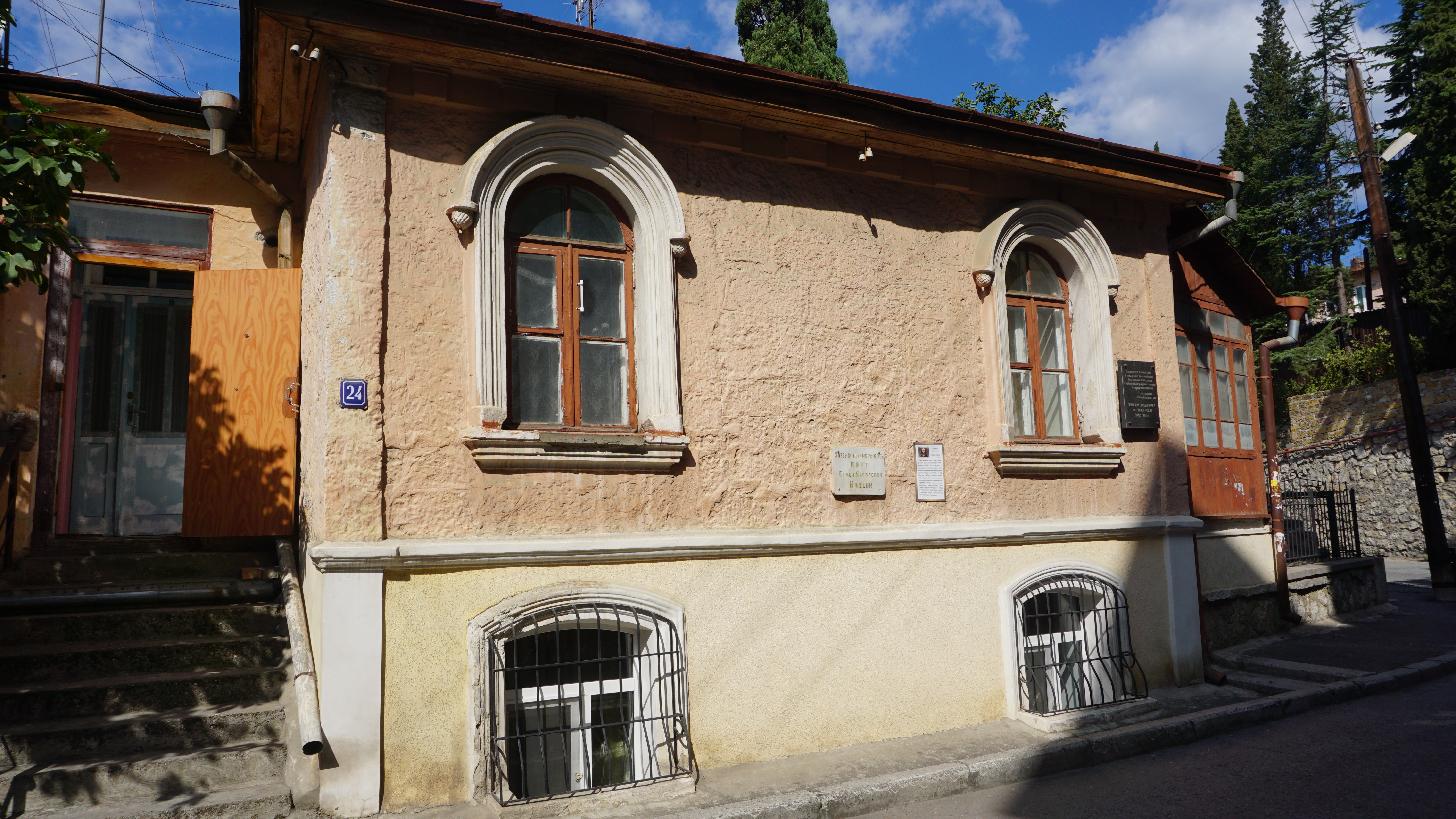 Дом, в котором в 1886-1887 гг. жил поэт С.Я.Надсон: улица Бассейная, 24, Ялта, Крым This object is located on the Crimean Peninsula and recognized as cultural heritage by Russia under the monument ID: 8231494000. The legal status of the Crimean region is currently disputed.